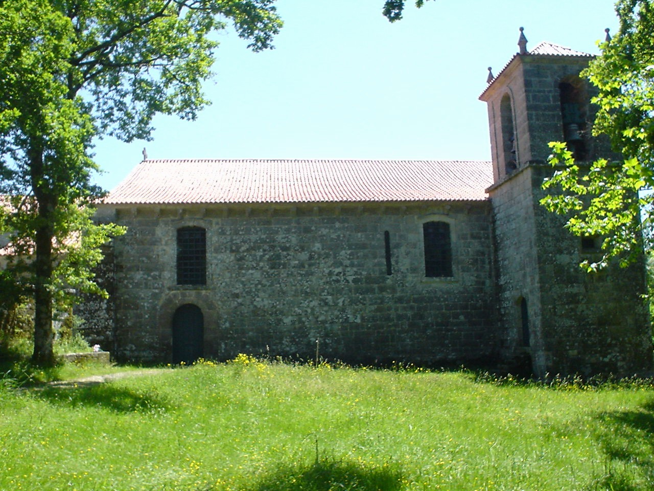 Kloster Fiaes, Portugal, Ansicht von Norden